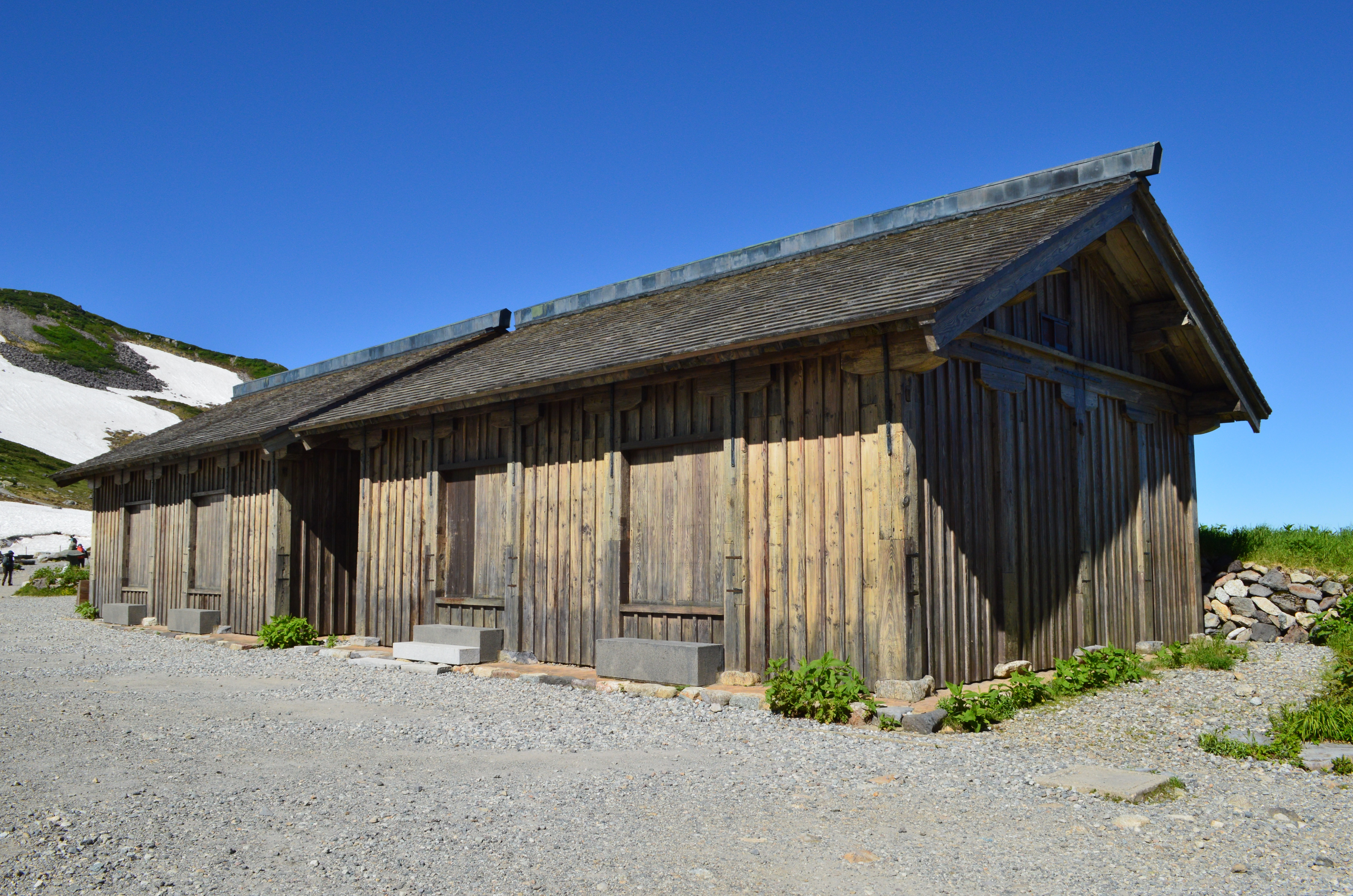 立山室堂 北棟側